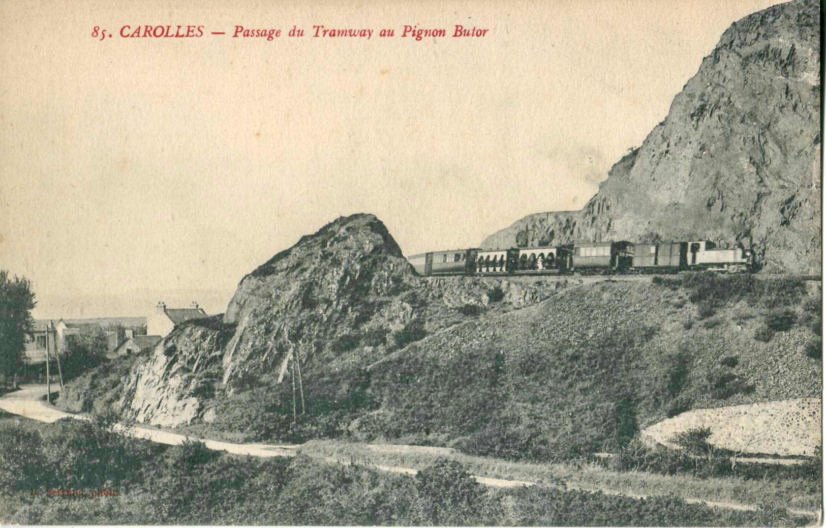 Carte postale ancienne, avec une mention d'éditeur peu lisible, sans doute Serrind, n°85 : CAROLLES - Passage du Tramway au Pignon Butor